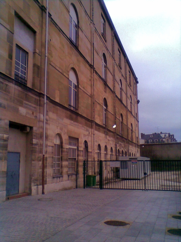 Site de l'ancien hôpital Saint-Lazare (Paris 10e) en restructuration, le carré historique